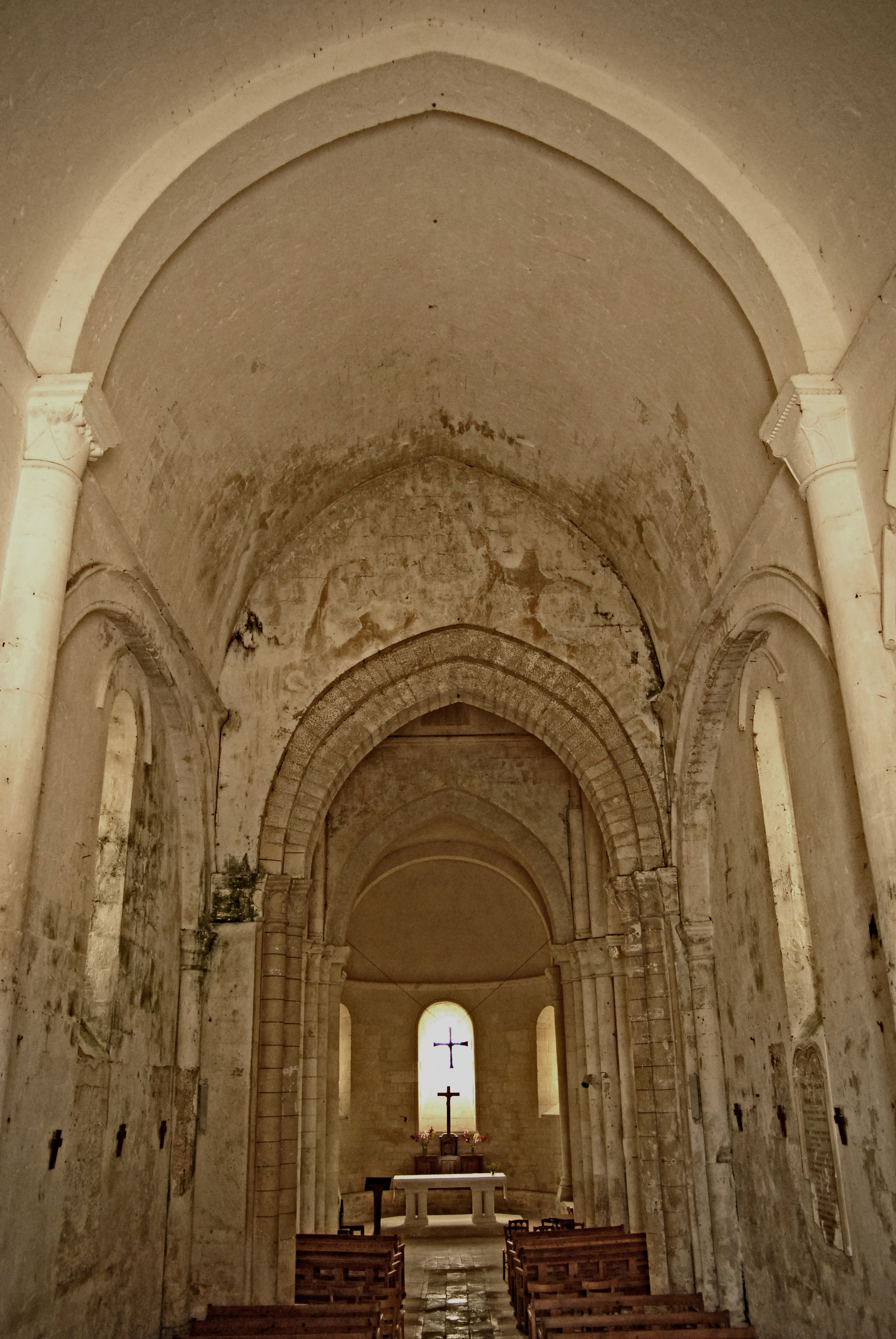 Notre-Dame Corme-Écluse, Schiff aus Joch 1